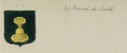 armorial prieure Saille Guerande